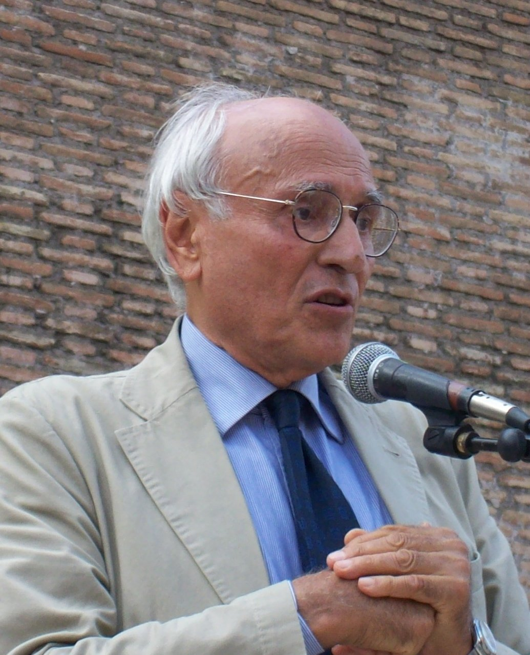 Manifestazione per il 140° anniversario della Presa di Roma: intervento del prof. Lucio Villari